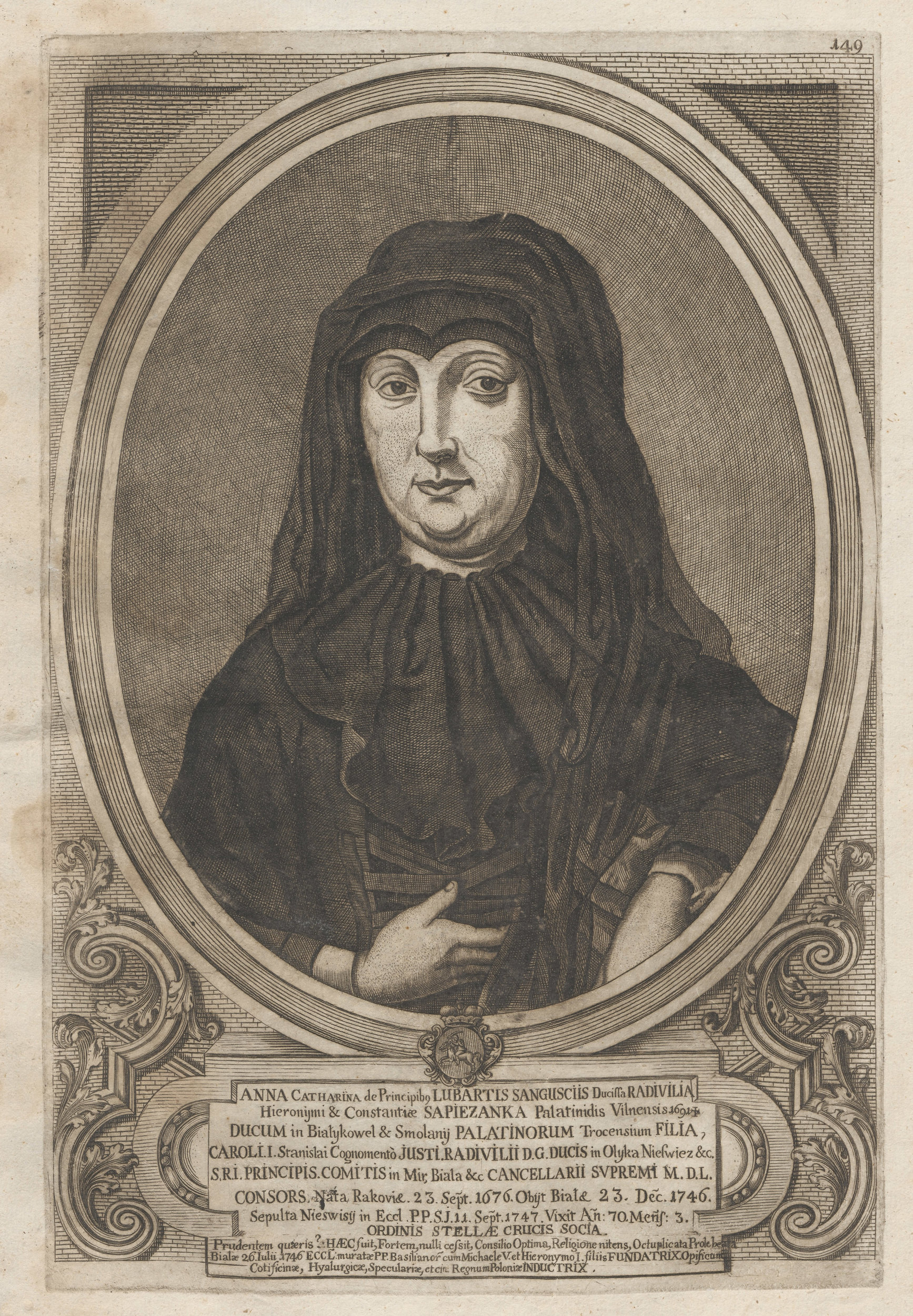 Беларуская (тарашкевіца): Партрэт Ганны Кацярыны Радзівіл (Hanna Kaciaryna Radzivił) з роду Сангушкаў (Sanguška)